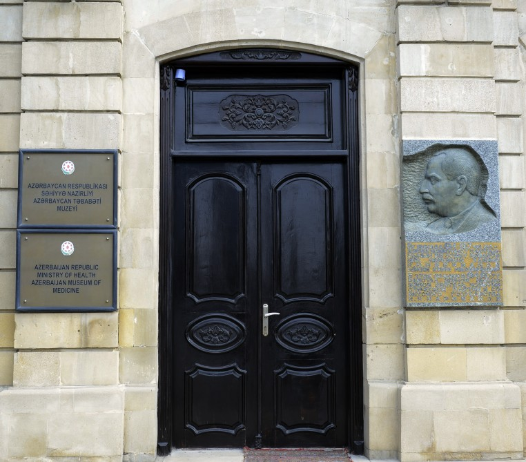 музей_медицины_Баку